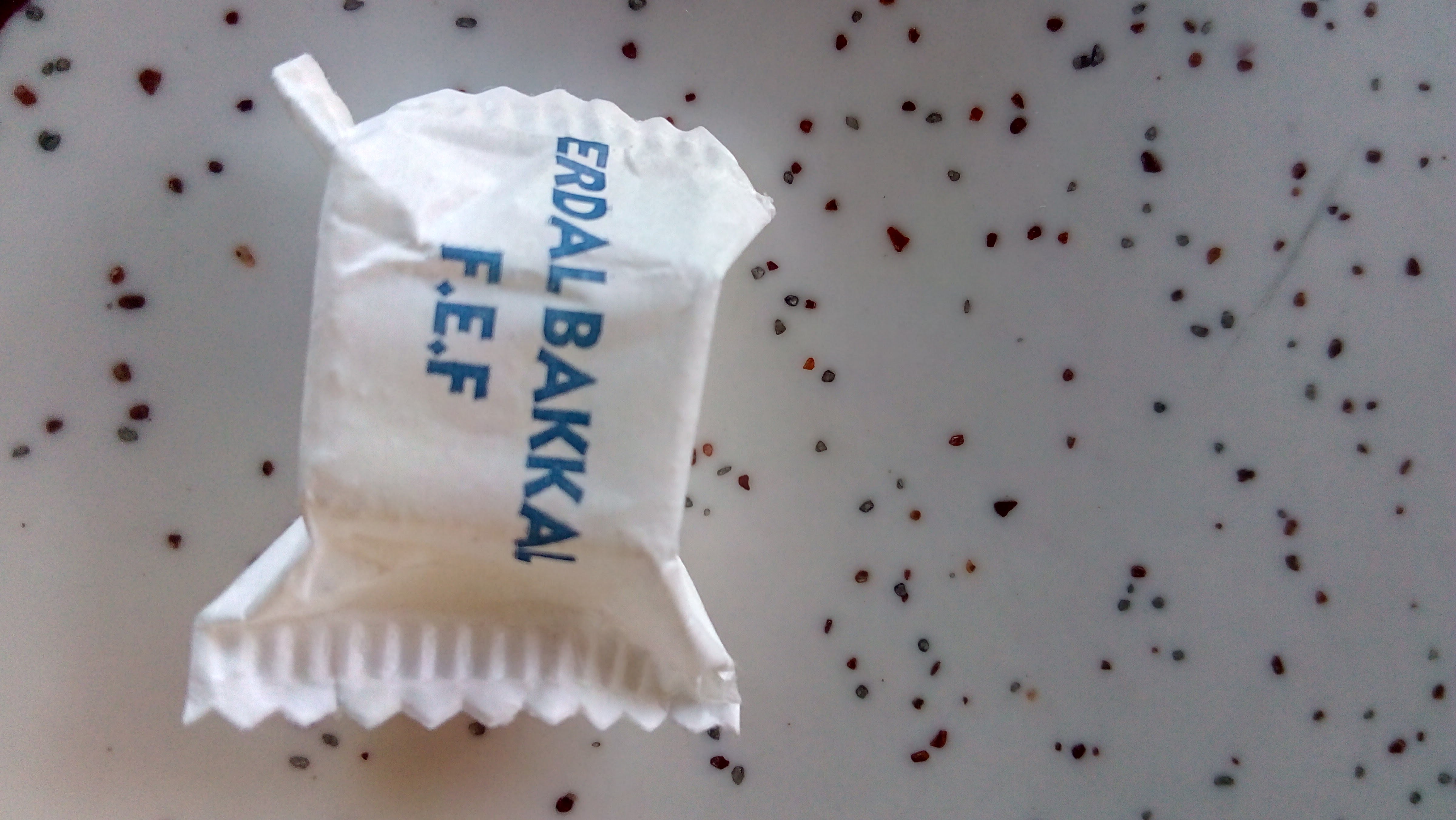 Çanakkale Onsekiz Mart Üniversitesi FEF kantini şekeri